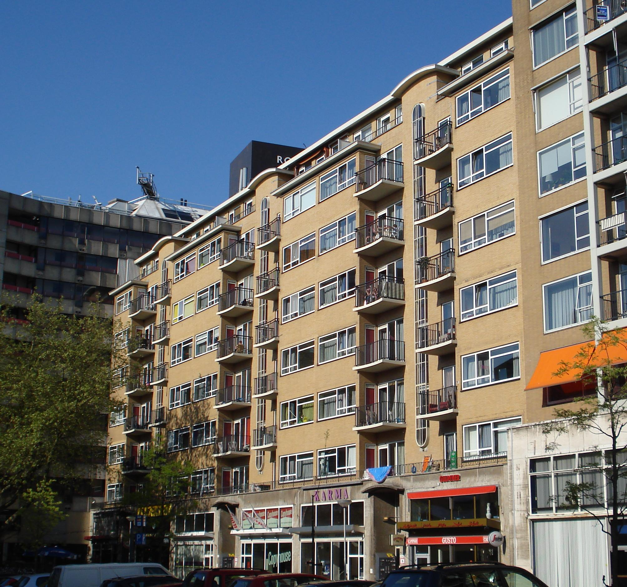 Rotterdam, Schiedamsevest 2-40. Rijksmonument.